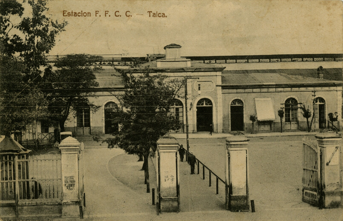 Fachada de la estación de ferrocarriles de Talca en 1927.